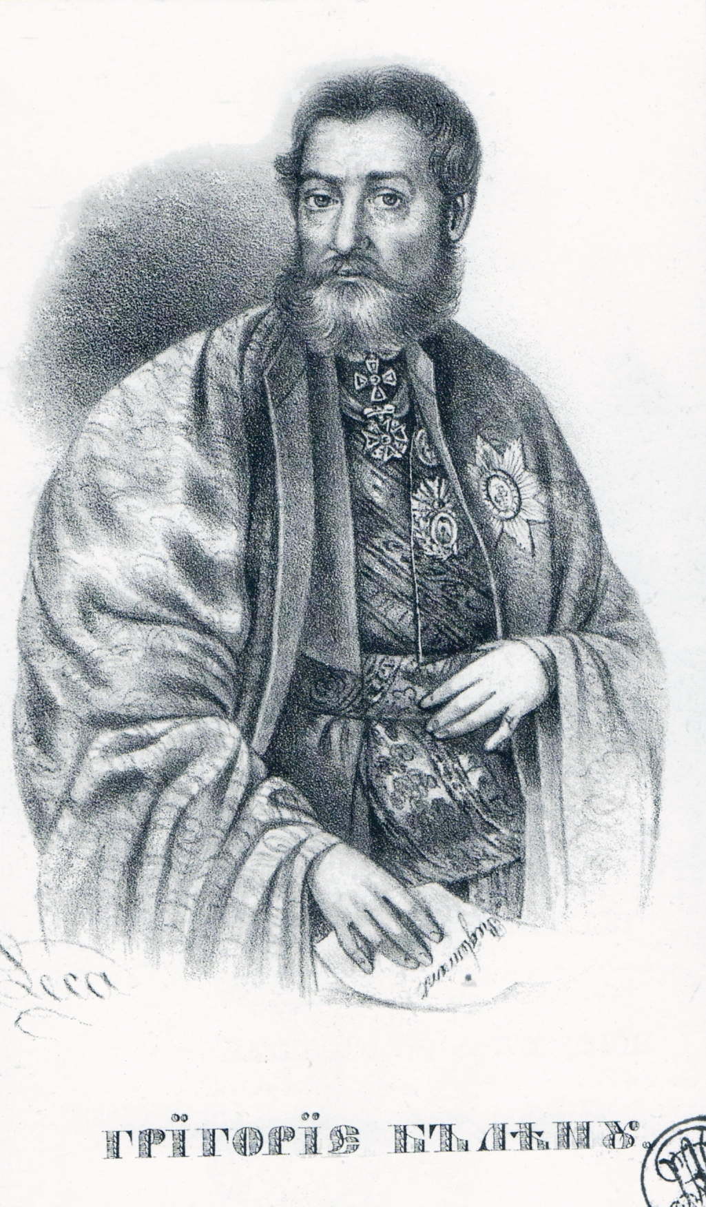 Grigore Băleanu, Buda, 1837, , litografie, Biblioteca Academiei Române, tipografia Crăiască din Buda Desenator: Constantin Lecca, legenda: ГPЇГOPЇЄ БЪΛЋNУ Sub portret, în partea stg.: Leca. Sub portret, în partea dr.: M. A. Personajul ţine în mâna dreapta o hârtie pe care se poate citi: Reglement. D = 18,2 x 11,2 cm Col.: Biblioteca Muzeului Olteniei, Craiova, inv. 5847 Bibliografie: Nicolae Iorga 1928, pp. 32-33, ilustraţia nr. 3; George Oprescu 1942, Pl. xxx II; Repertoriul 1974, p. 236, cat. nr. 1179; Paul Rezeanu 2005, p. 9